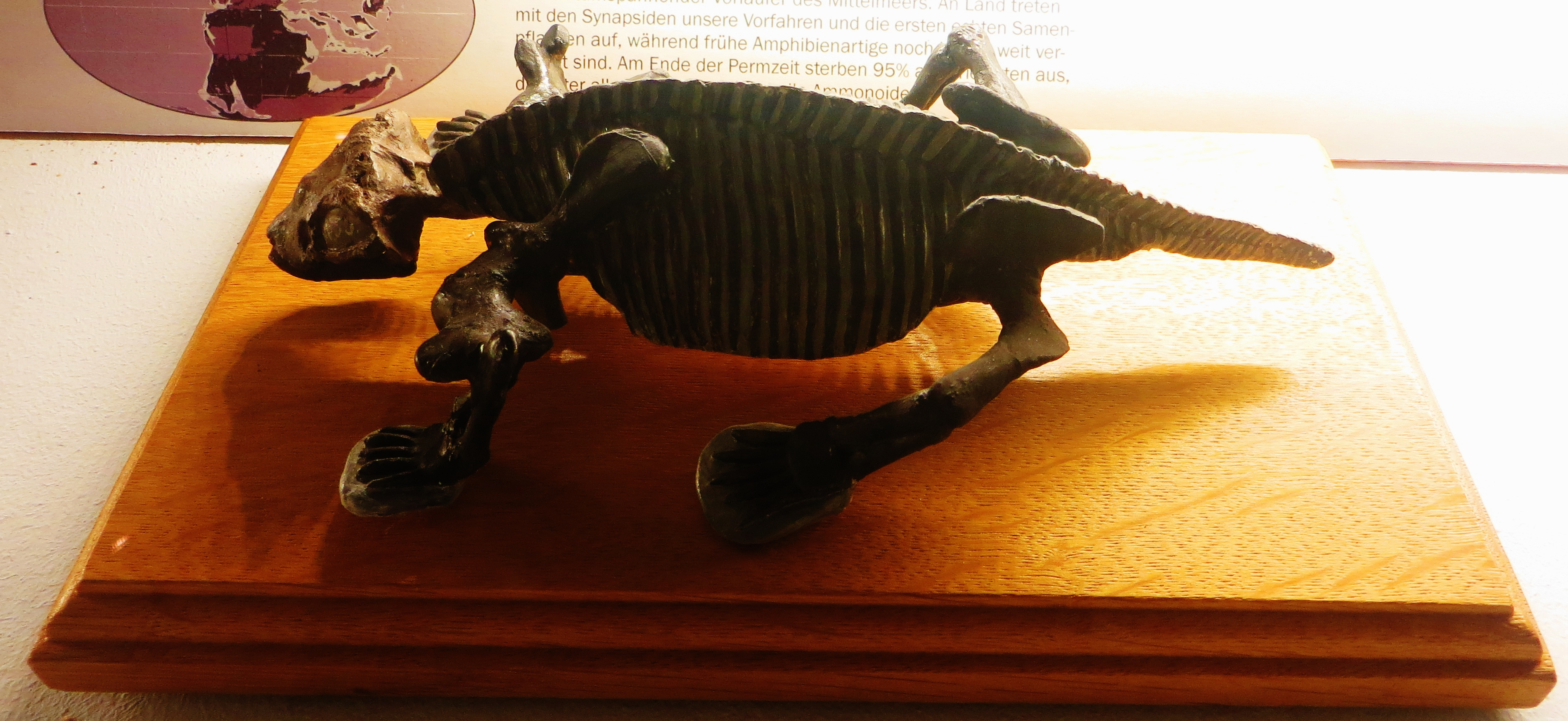 Fossil of Kawingasaurus, an extinct therapsid- Took the picture at Museum of Paleontology, Tuebingen